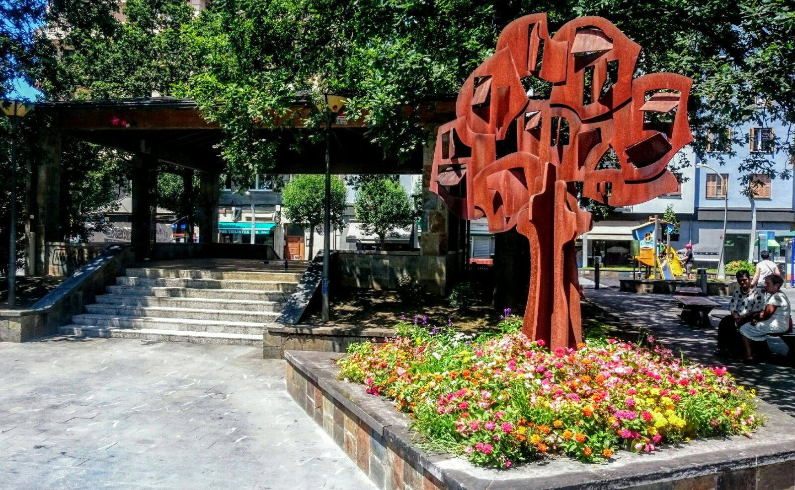 Xenpelar bertsolariaren omenezko eskultura Errenteriako Xenpelar plazan